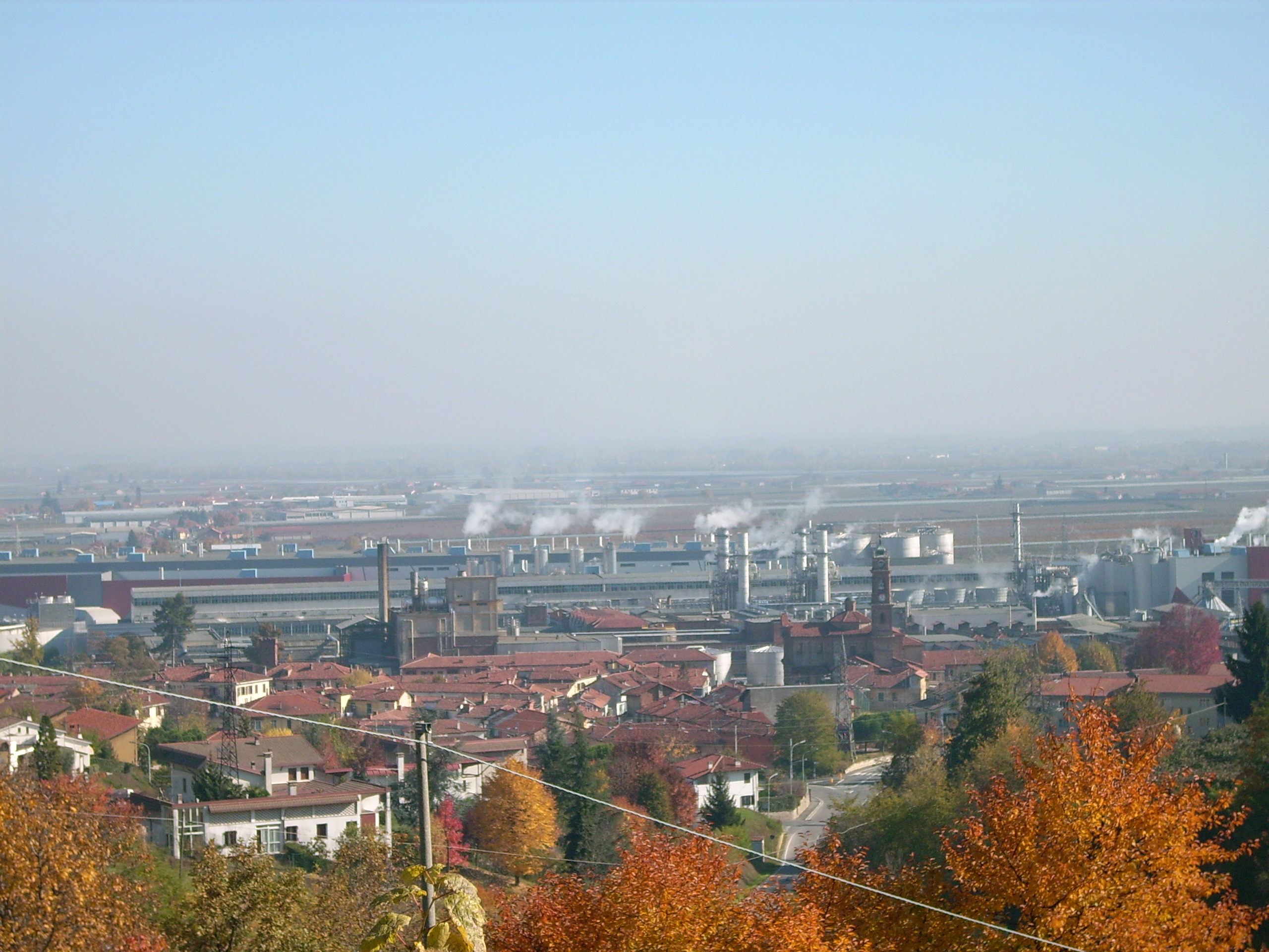 Cartiera Burgo, Verzuolo, Piemonte, Italia